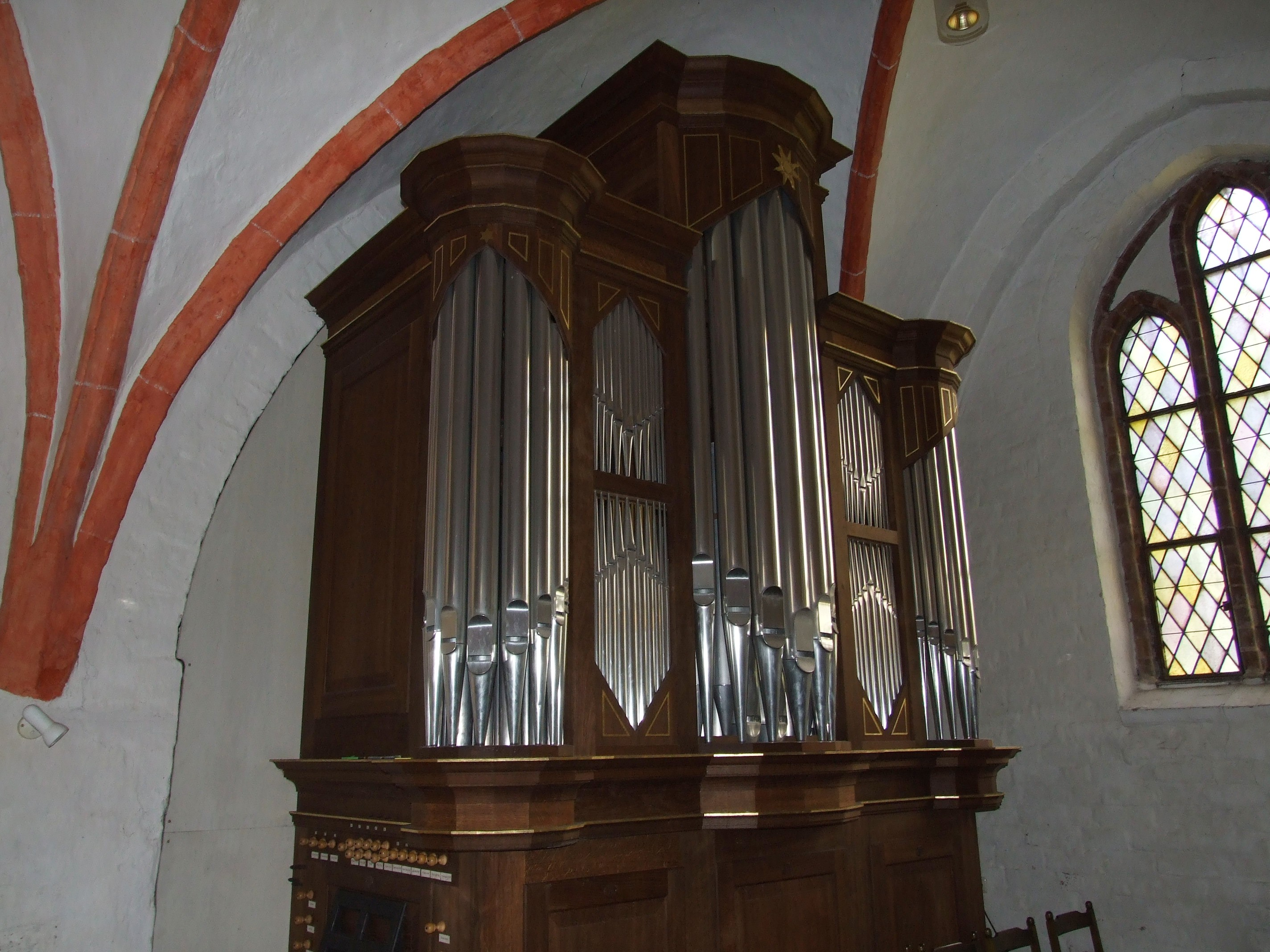 Chororgel im Güstrower Dom, von Kristian Wegscheider (Dresden) aus dem Jahr 1996